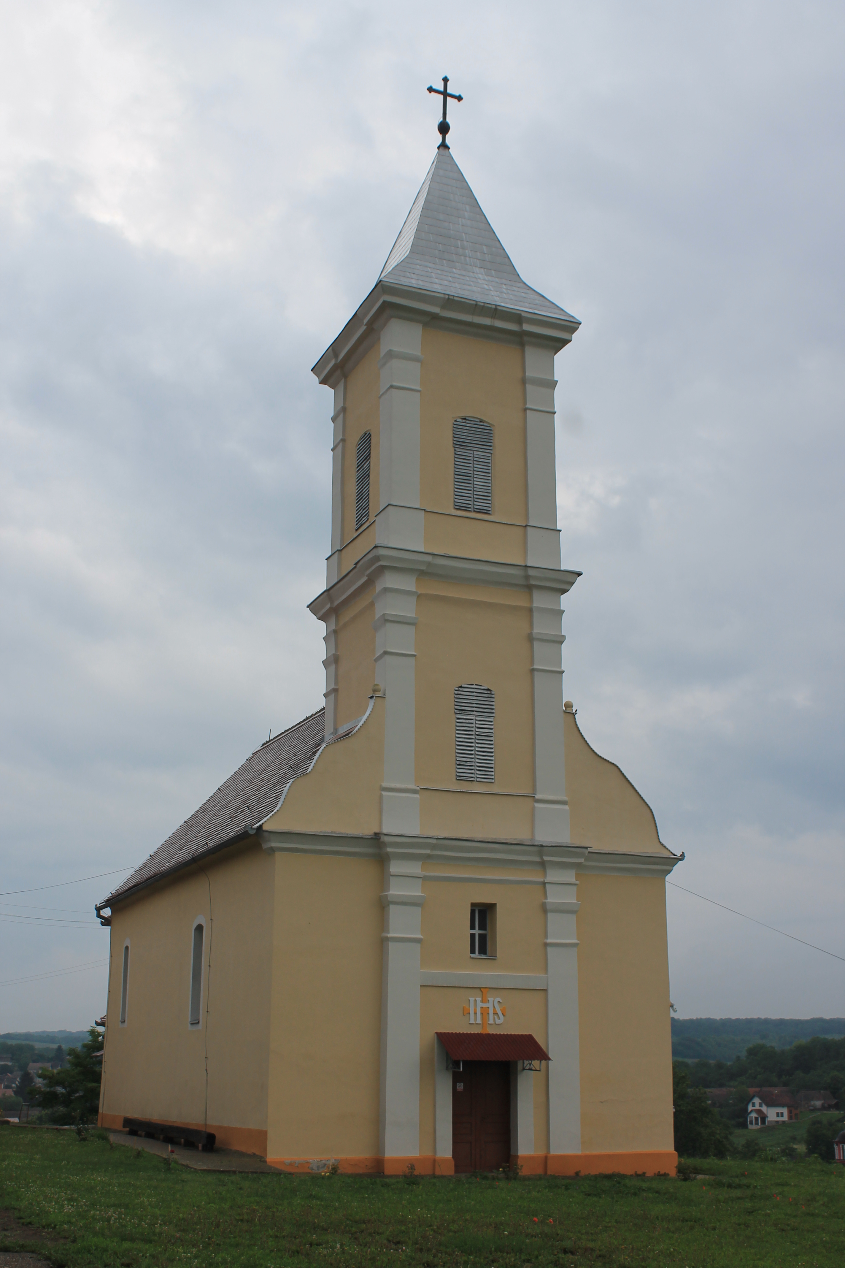 Rimokatolička crkva Sv. Katarine (Sot)